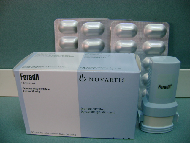 Форадил, капсулы для ингаляций